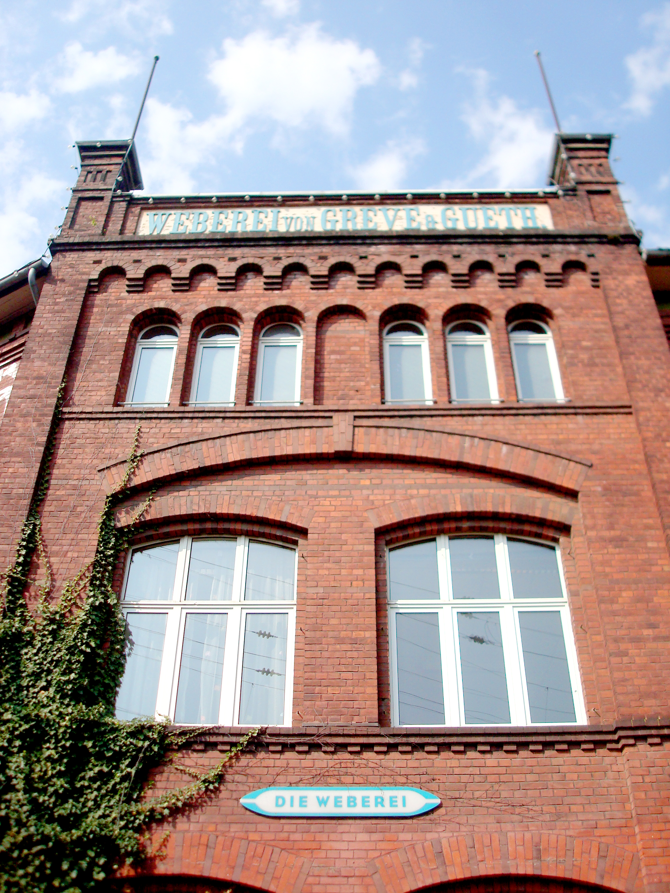 Die Weberei Gütersloh This is a photograph of an architectural monument. 143